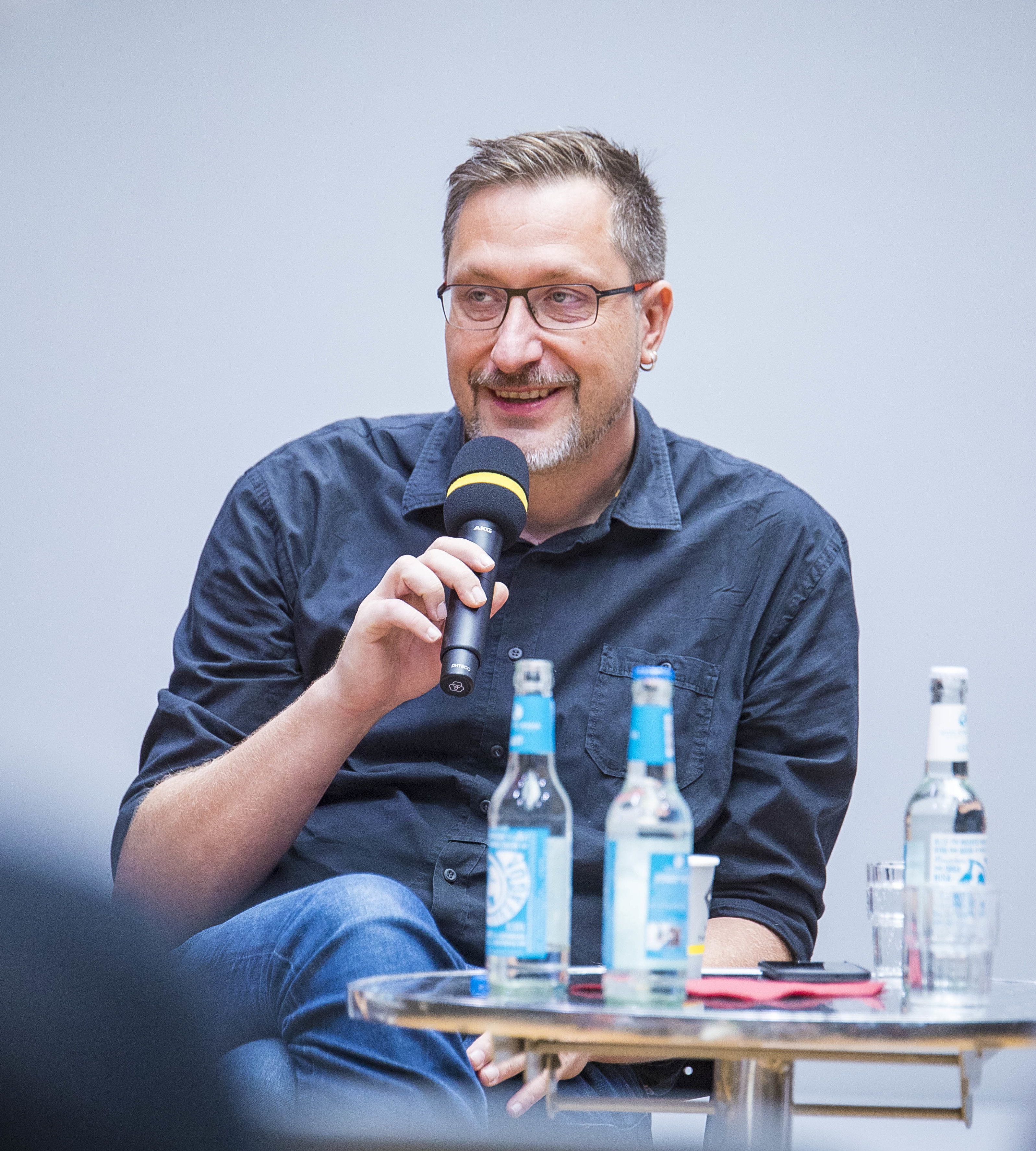 Podiumsdiskussion: "Partei der Zukunft: Partei in Bewegung" Mit Niklas Haupt (Mittelfränkischer Spitzen-kandidat der LINKEN zu den bayerischen Landtagswahlen), Thomas Goes (Wiss. Mitarbeiter am Soziologischen Forschungsinstitut (SOFI) Göttingen) und Jörg Schindler (Bundesgeschäftsführer DIE LINKE)